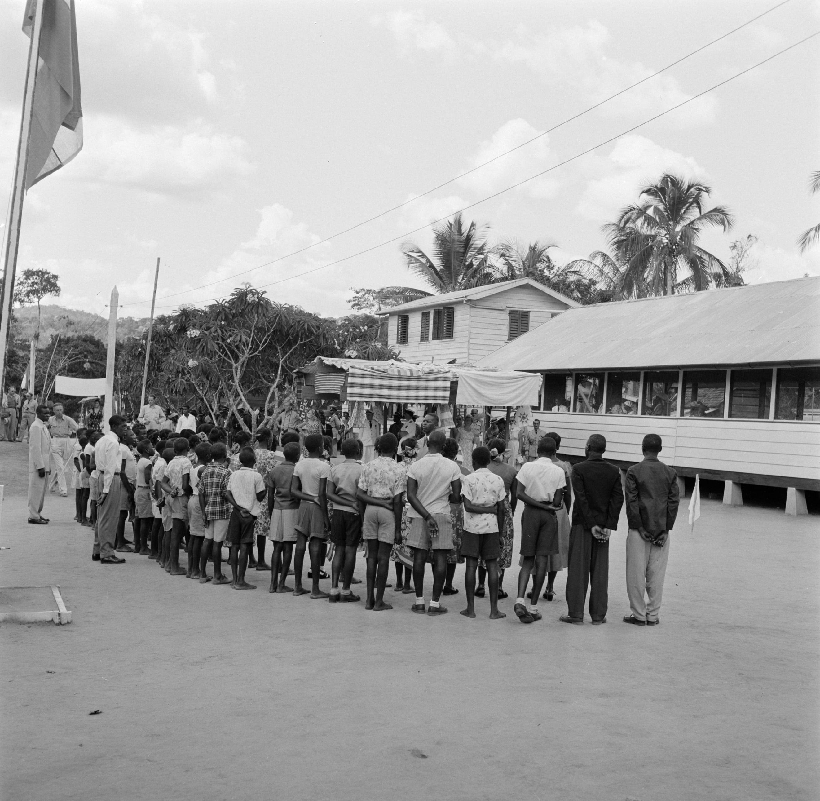 Collectie / Archief : Fotocollectie Van de Poll Reportage / Serie : Nederlandse Antillen en Suriname ten tijde van het koninklijk bezoek van koningin Juliana en prins Bernhard in 1955 Beschrijving : Boslandcreoolkinderen bij hun school in Koffiekamp in afwachting van het koninklijk gezelschap Datum : oktober 1955 Locatie : Koffiekamp, Suriname Trefwoorden : bosneger, inheemsen, kinderen , scholen Fotograaf : Poll, Willem van de Auteursrechthebbende : Nationaal Archief Materiaalsoort : Negatief (zwart/wit) Nummer archiefinventaris : bekijk toegang 2.24.14.02 Bestanddeelnummer : 252-4369